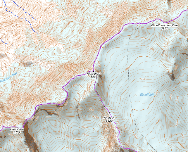 carte réalisée sur umap This map may be incomplete, and may contain errors. Don't rely solely on it for navigation.